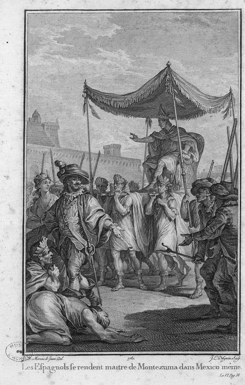 Jean-Michel Moreau (1741-1814) dit Moreau le Jeune, dessinateur ; Guillaume Thomas Raynal, auteur du texte.- Les espagnols se rendent maître de Montezuma dans Mexico Même, Illustration de Histoire philosophique et politique des établissements et du commerce des Européens dans les deux Indes, Jean-Léonard Pellet, Genève, 1780. Acquisition du Musée de l'Homme, Bibliothèque du Musée de l'Homme. Réserve D 28 R 27 1780 t.2, Paris. Description matérielle : 1 est. : taille-douce : N. et b. ; 19 x 11,5 cm.